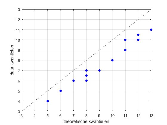 Een Q-Q plot waar op de horizontale as de kwantielen van een Poissonverdeling zijn weergegeven en op de verticale as de kwantielen van een onbekende dataset. De punten liggen niet op de lijn y=x, maar een beetje verschoven. Zodoende zal de data waarschijnlijk niet uit deze verdeling komen.